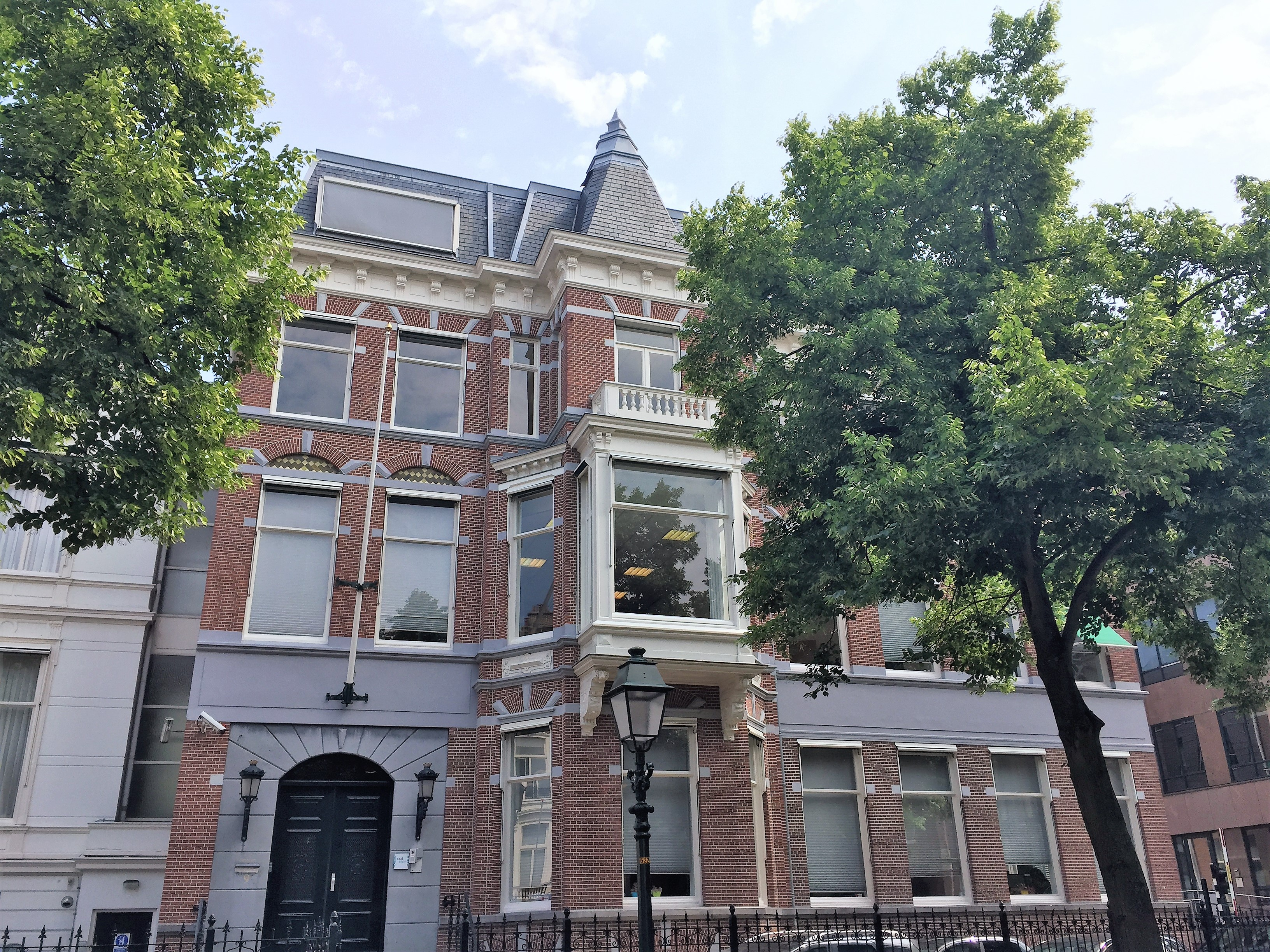 Kantoor Taalunie Paleisstraat, Den Haag